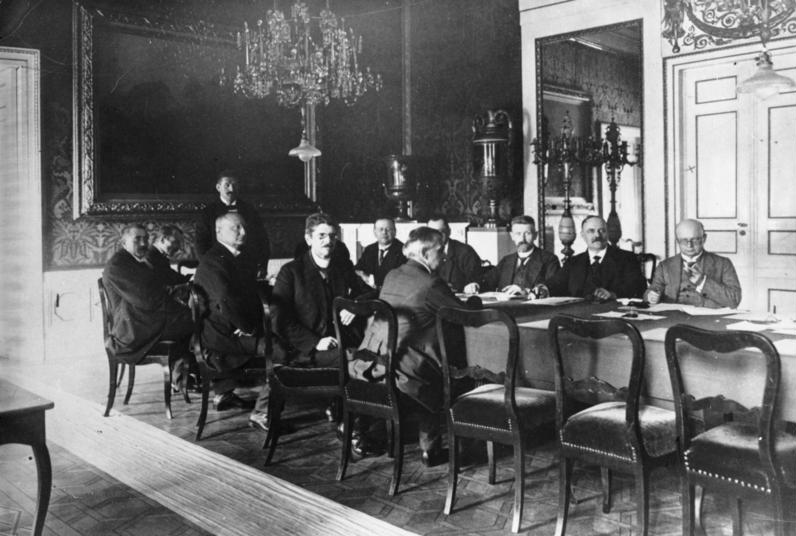 Kabinett Gustav Bauer ADN-ZB/Archiv Das Kabinett Gustav Bauer (21.6.1919-26.3.1920) UBz: von links: Reichswehrminister Gustav Noske, Pressechef der Reichsregierung Ulrich Rauscher (Oktober 1919 bis Juni 1920), vorn Reichsschatzminister Wilhelm Mayer-Kaufbeuren (21. Juni 1919 bis 30. Januar 1920), dahinter Reichskanzler Gustav Bauer (21. Juni 1919 bis 26. März 1920), Reichsminister für Verkehr und Kolonien Johannes Bell (21. Juni 1919 bis 30. April 1920), dahinter verdeckt Staatssekretär in der Reichskanzlei Heinrich Albert, Vizekanzler und Reichsfinanzminister Matthias Erzberger, Reichsaußenminister Alexander Schlicke, dahinter verdeckt Reichsaußenminister Hermann Müller-Franken, Reichswirtschaftsminister Rudolf Wissel, Reichspostminister Johannes Giesberts, Reichsinnenminister Erich Koch-Weser. Information added by Wikimedia users. Kabinett Bauer 21. Juni 1919 – 27. März 1920